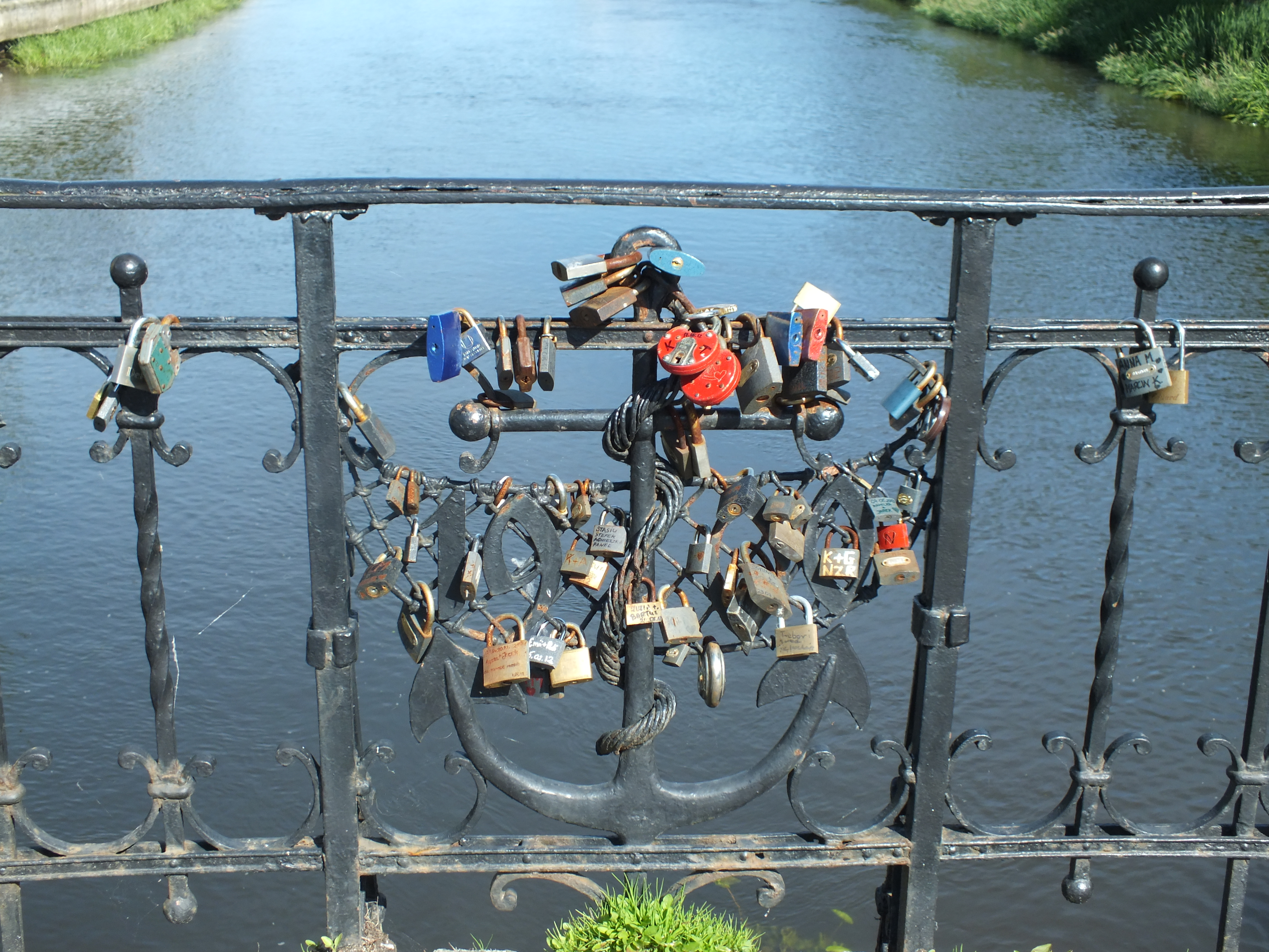 Kłódki miłości na moście nad Parsętą w Kołobrzegu